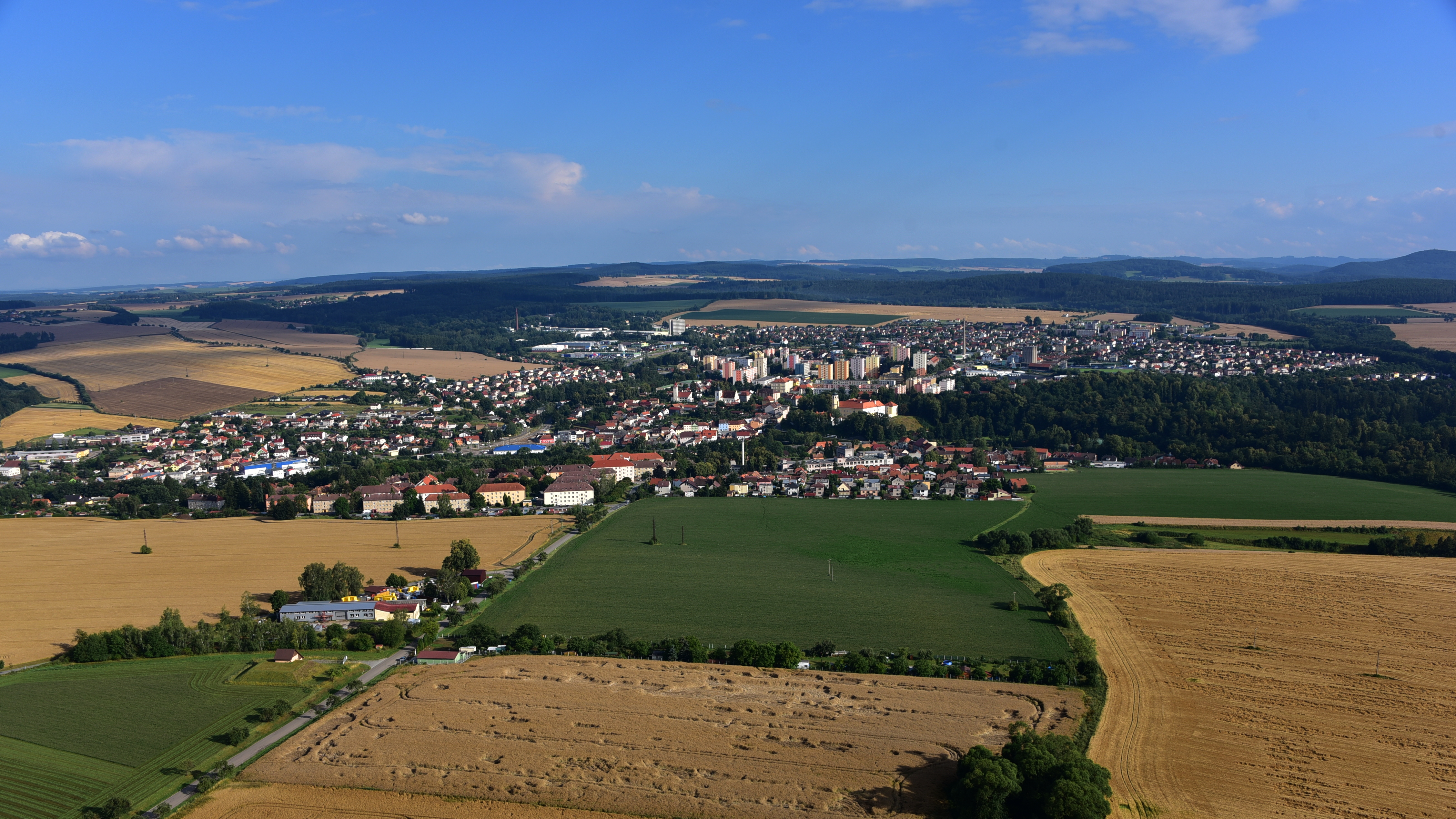 CZ - Vlašim, Luftaufnahme (2018)